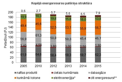 tabula par kopējo energoresursu patēriņu Latvijā no 2005.gada līdz 2015.gadam.